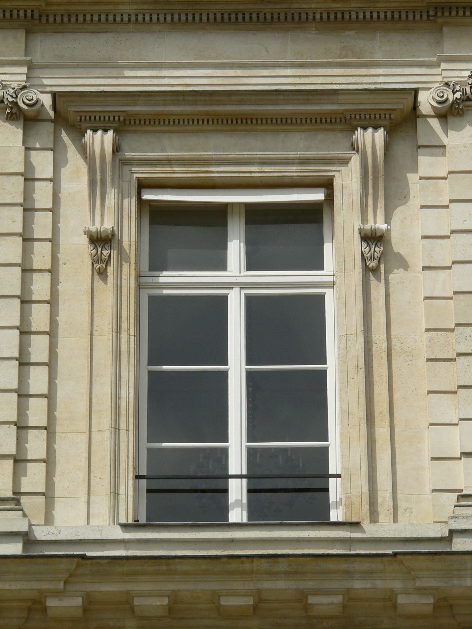 Palais du Luxembourg Fenêtre, 2ème étage (façade côté jardin) 2005 Source : Clio20